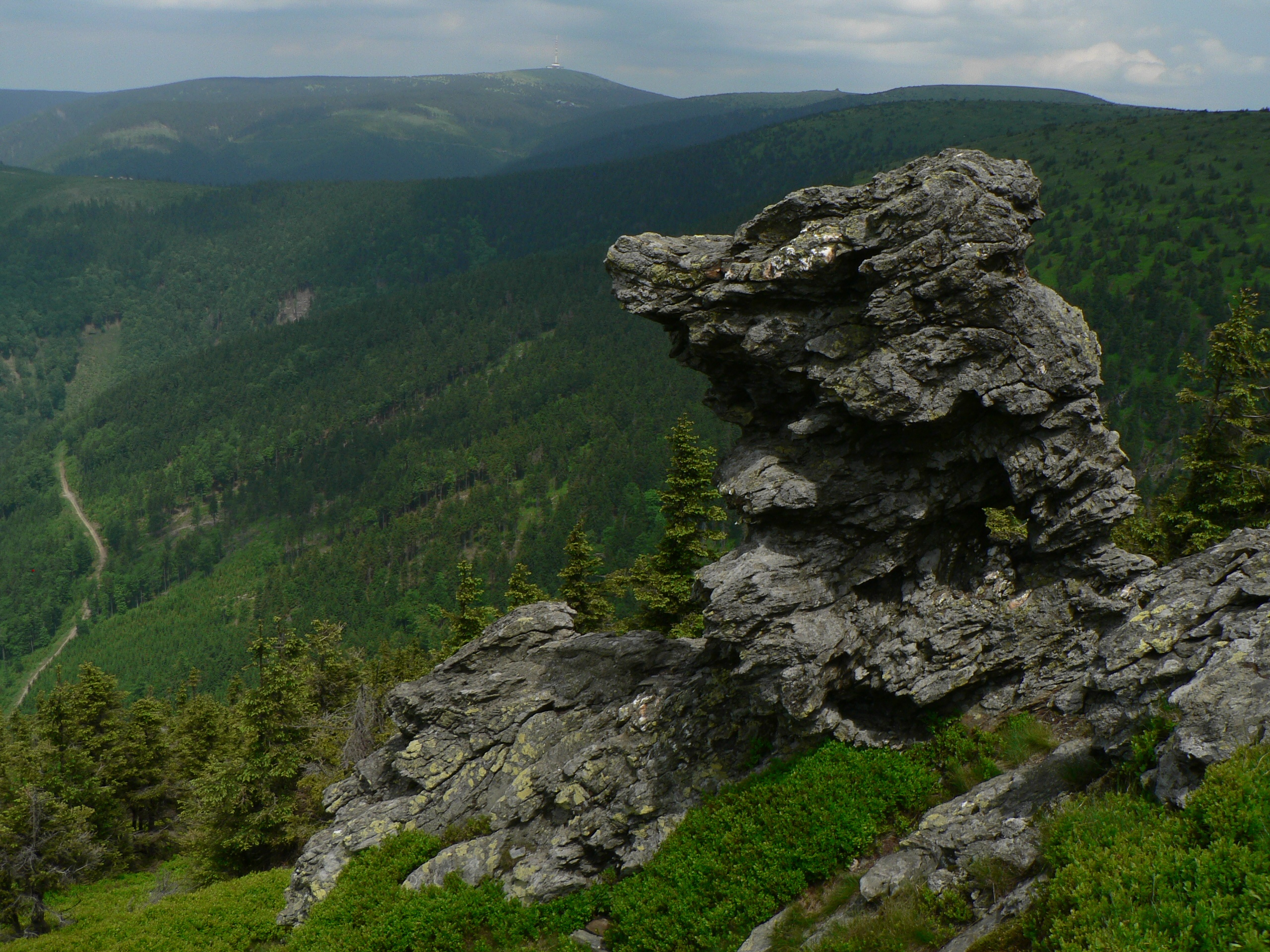 Skalní útvary pod vrcholem Břidličné.